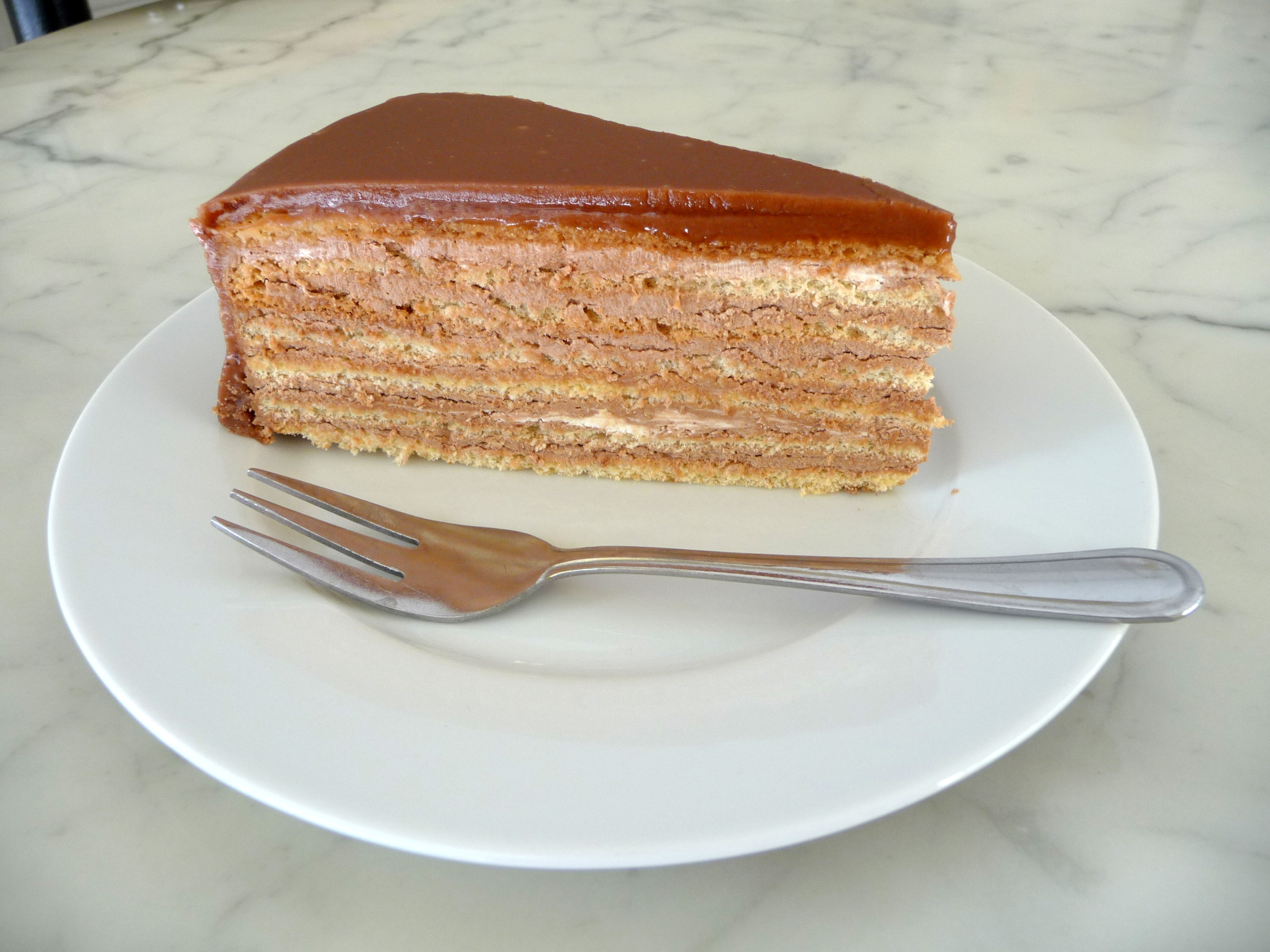 Im alten München wurde zur traditionellen Prinzregententorte außer Kaffee und Tee gerne auch Weißbier getrunken. Das Tortenstück stammt aus dem Cafe Erbshäuser und wird streng traditionell nach dem Originalrezept hergestellt.